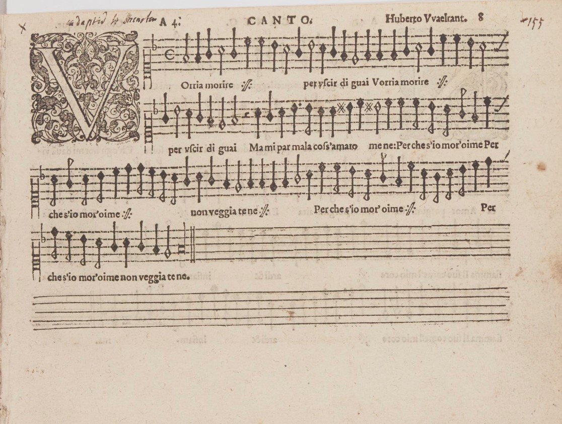 The song 'Vorria morire' by Hubert Waelrant is included in the 'Symphonia angelica di diversi eccellentissimi mvsici a iiii. v. et vi. voci, nvovamente raccolta per Hvberto Vvaelrant, et data in lvce. Nella quale si contengono i più Eccellenti Madrigali che hoggidi si cantino' by Hubert Waelrant, published by Petrus Phalesius & Johannes Bellerus, in Antwerp in 1590